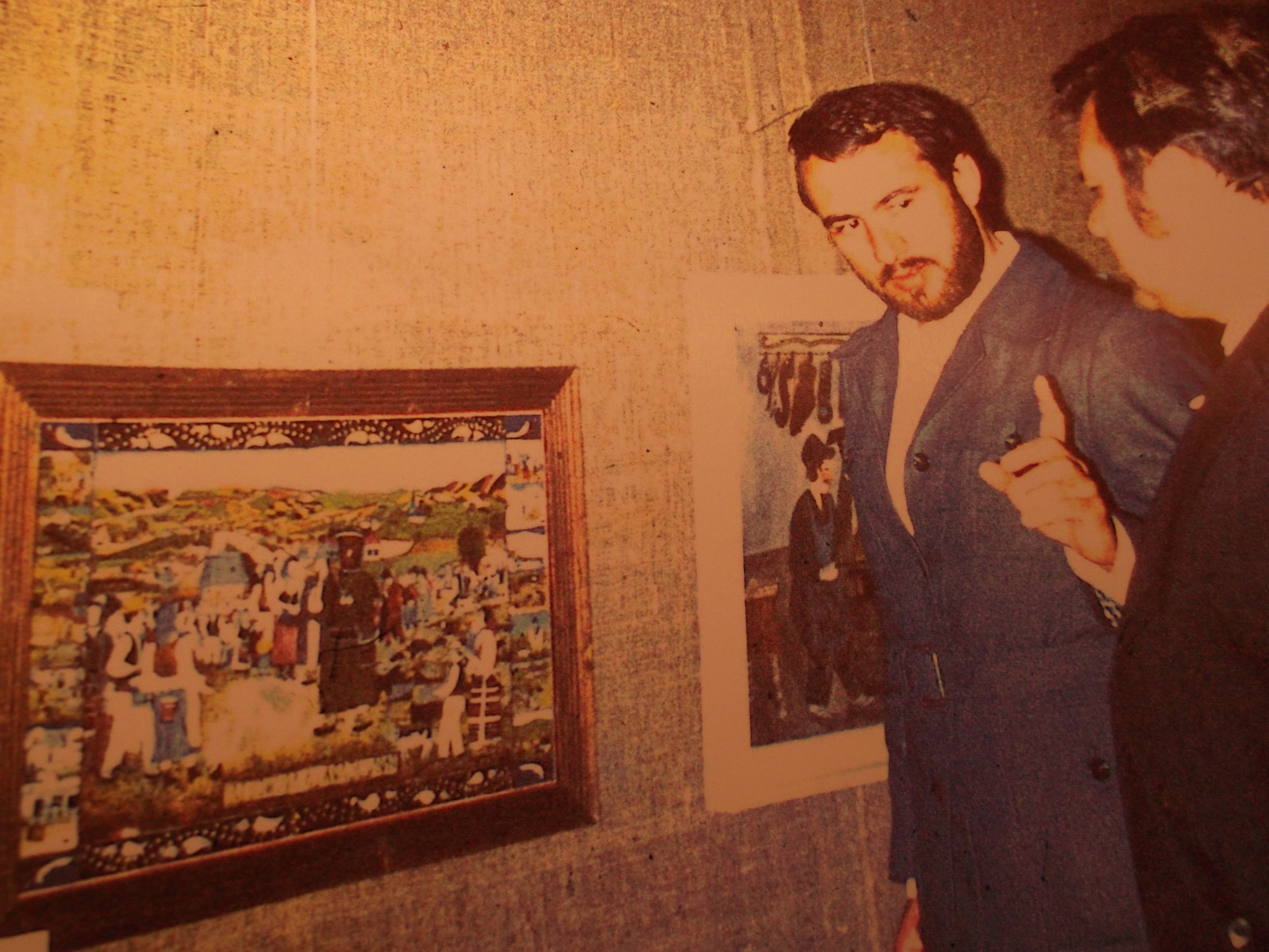 Pictorii Alexandru si Mihai Chereches din Aruncuta , prezenti la expozitia de Arta Naiva de la Arad , anul 1976. In prim planul exponatelor se observa celebra pictura " Papalugara de la Aruncuta "